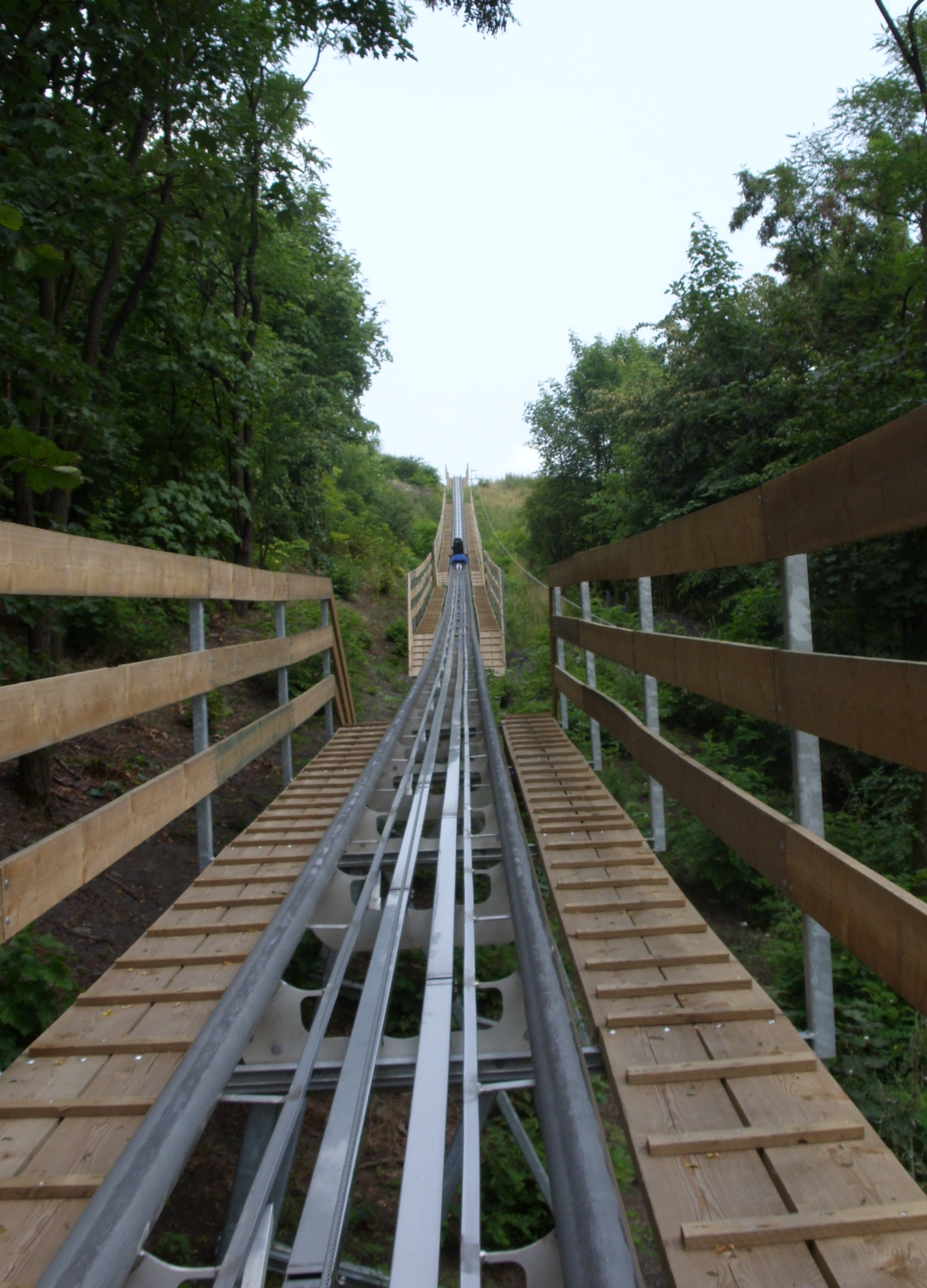 Ende der Sommerrodelbahn des alpincenters Bottrop, wo eine Konstruktion den Rodler den Berg wieder hochzieht.